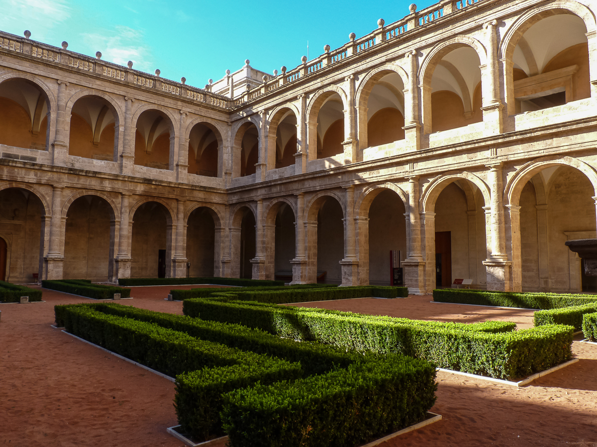 CONVENTO DE SAN MIGUEL DE LOS REYES DE VALENCIA 06122009 120535 00004.jpg